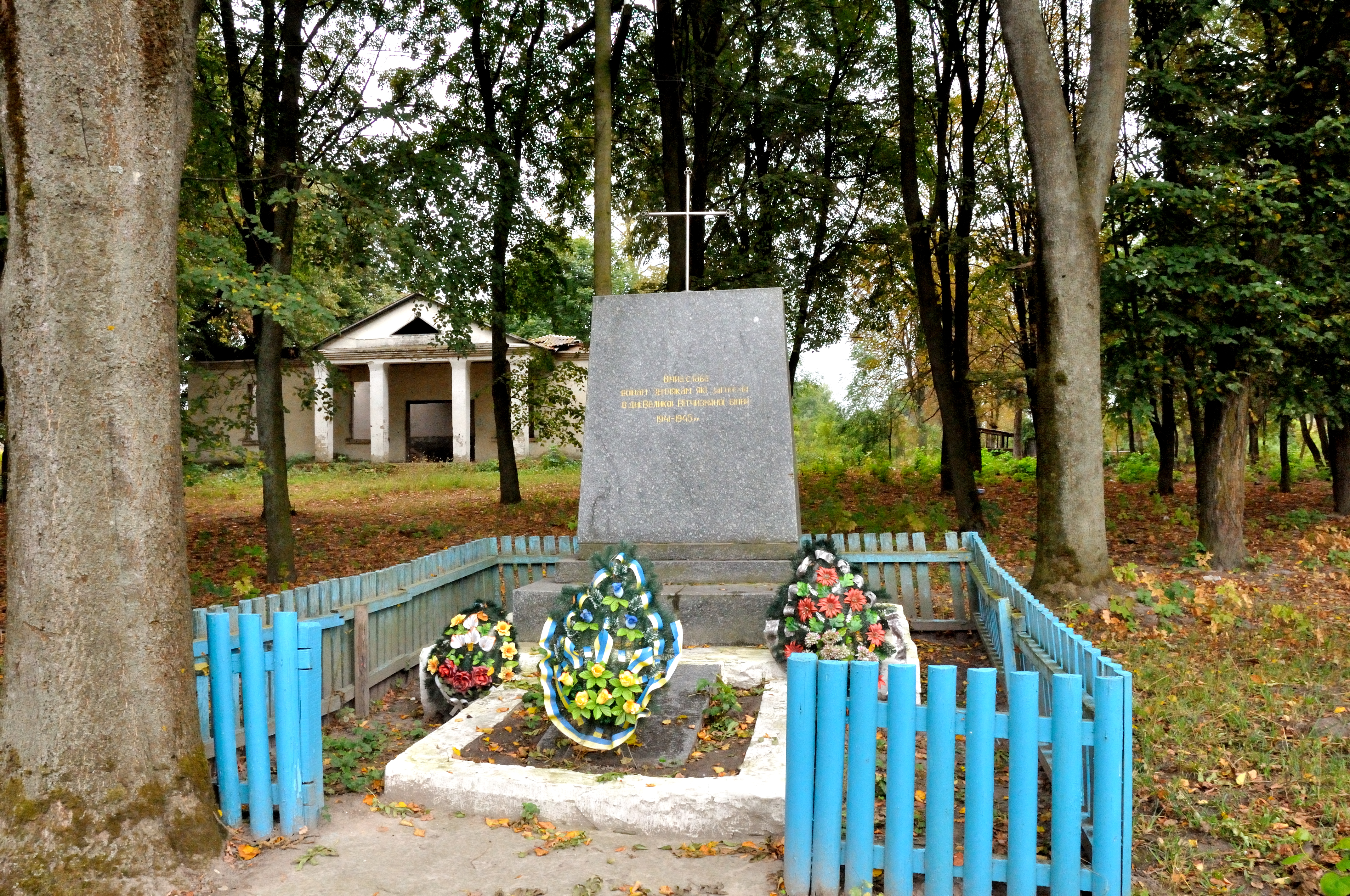 Пам’ятник воїнам-односельчанам, с. Липки